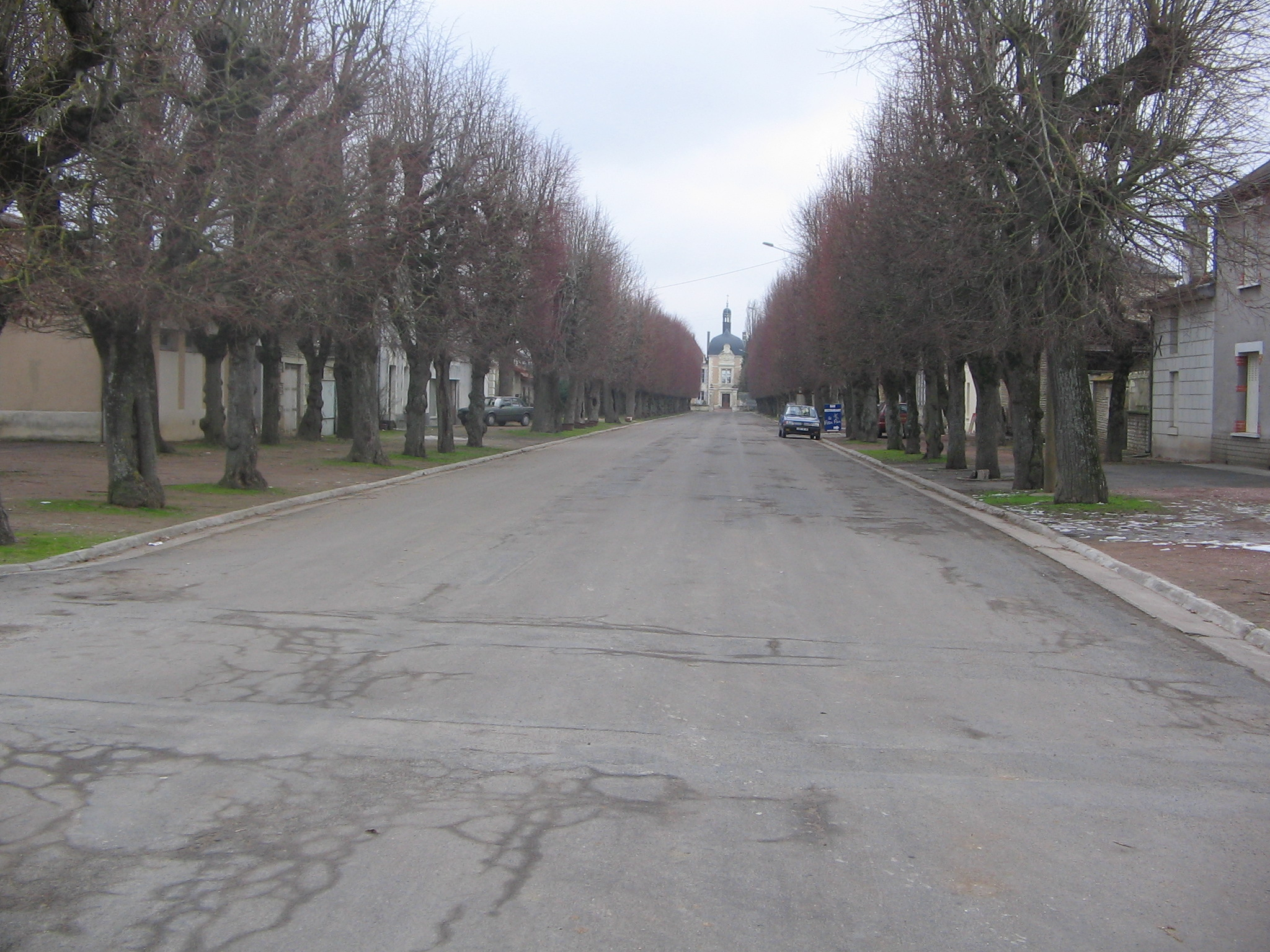 L'Avenue à Angliers, Vienne, France Photograph taken by me